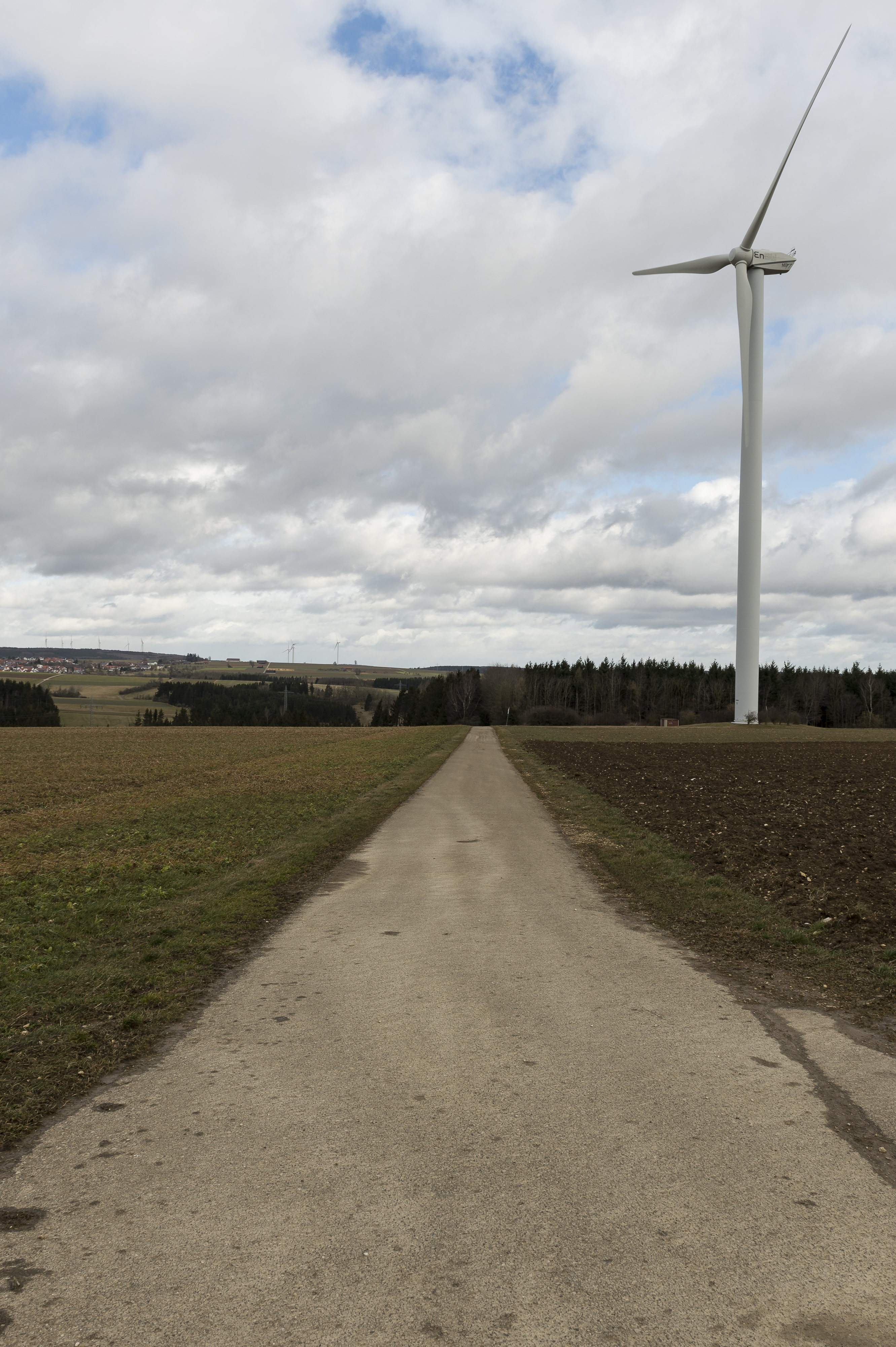 Verlauf des Alb-Limes zwischen Urspring (Ad Lunam) und Heidenheim (Aquileia), 2 km nordwestlich von Gerstetten-Gussenstadt. Der römische Straßenkörper war hier als 0,7 m hohe und 6 m breite Erhöhung sichtbar. Am 5. Oktober 1977 wurde vom Landesdenkmalamt Stuttgart ein Profil der Straße aufgenommen, bevor die Aufschüttung planiert und der heutige Straßenbelag eingebaut wurde. Der Alb-Limes verlief hier Richtung Norden hinunter ins Eseltal, wo er in Richtung Westen nach Heidenheim abbog.Vgl. Stefan Franz Pfahl: „Die römische und frühalamannische Besiedlung zwischen Donau, Brenz und Nau“Kapitel X: Das Straßennetz, A. Urspring – Heidenheim